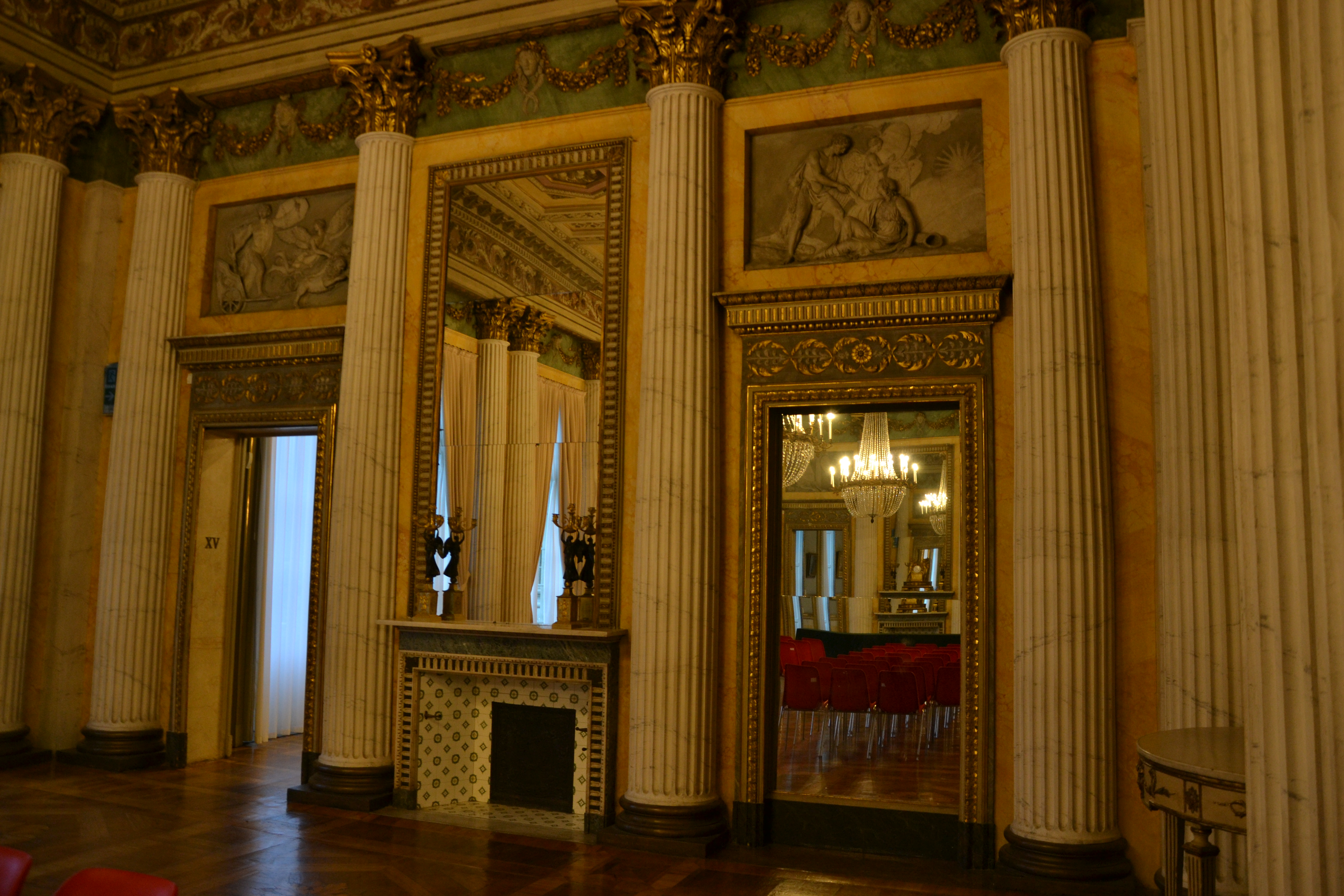 Villa reale, Milano - sala da ballo